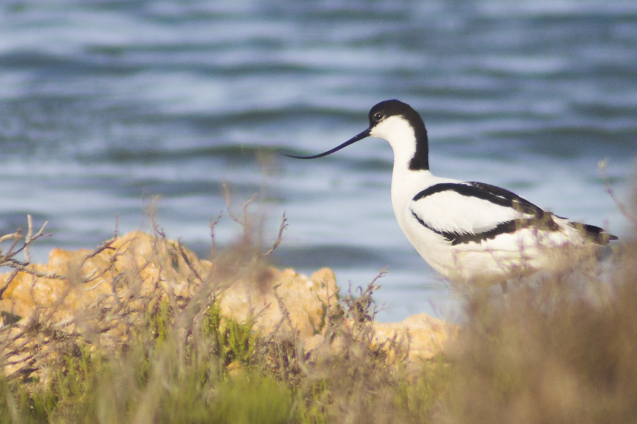 Parque natural de las Lagunas de La Mata y Torrevieja This is a photography of a Special Area of Conservation in Spain with the ID: ES0000059. Natura2000 entry, EEA entry